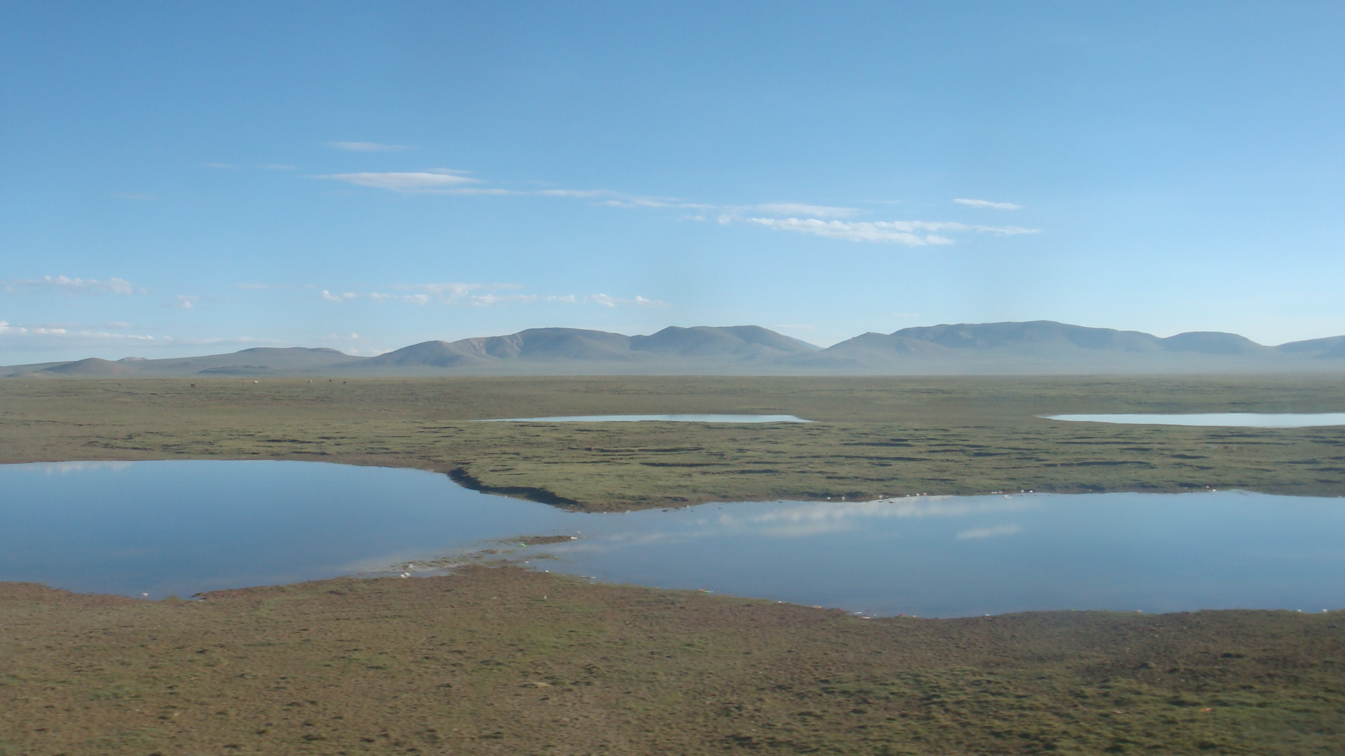 中国西藏 China Tibet China Xinjiang Urumqi Welcome you to tour the, Китай Синьцзяна Урумчи приветствовать Вас на экскурсию, الصين ترحب زيارتك لاورومتشى فى شينجيانغ, 中国新疆のウルムチへの訪問を歓迎する, 中国新疆乌鲁木齐欢迎您来观光旅游